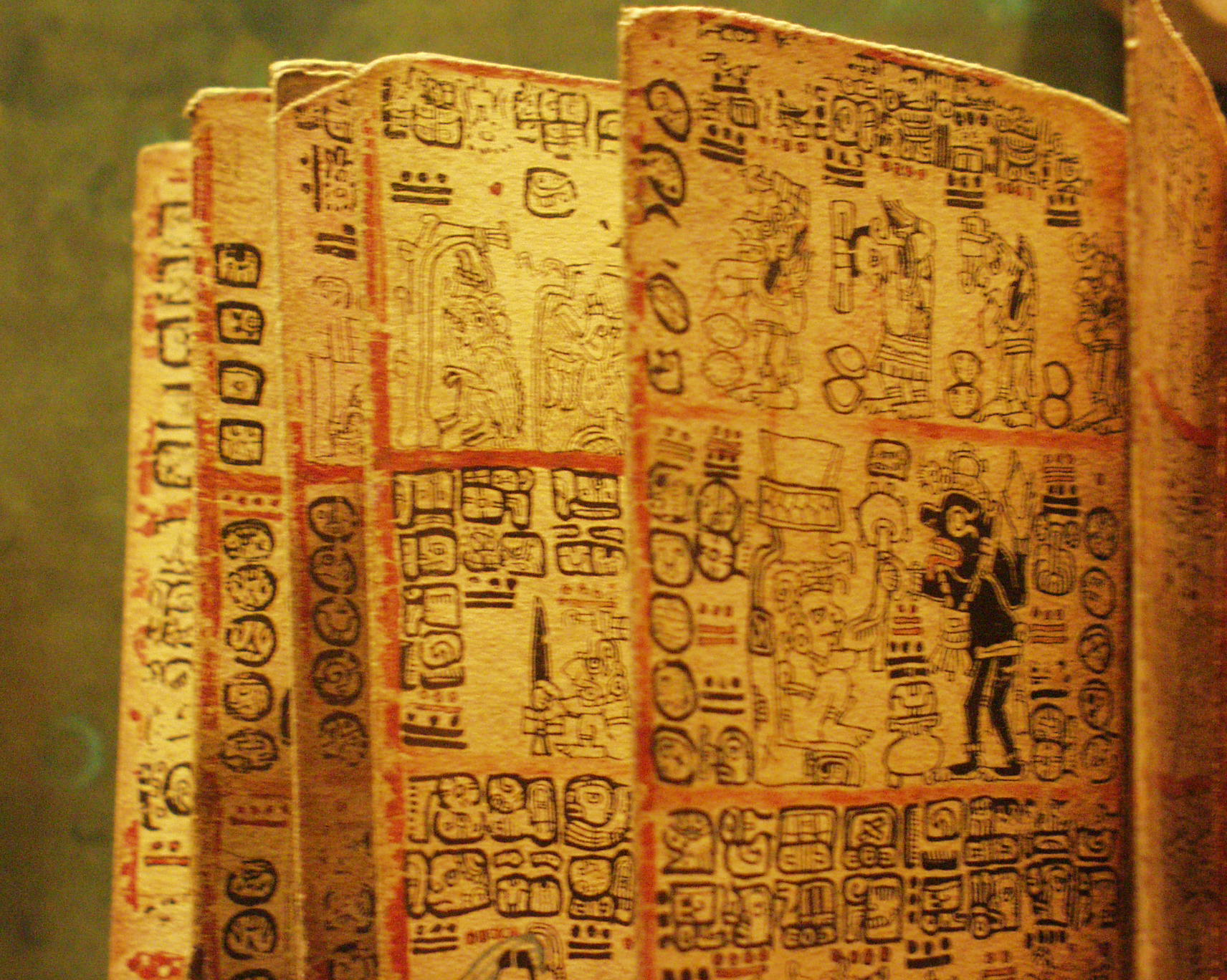 Museo Nacional de Antropologia in Mexico City